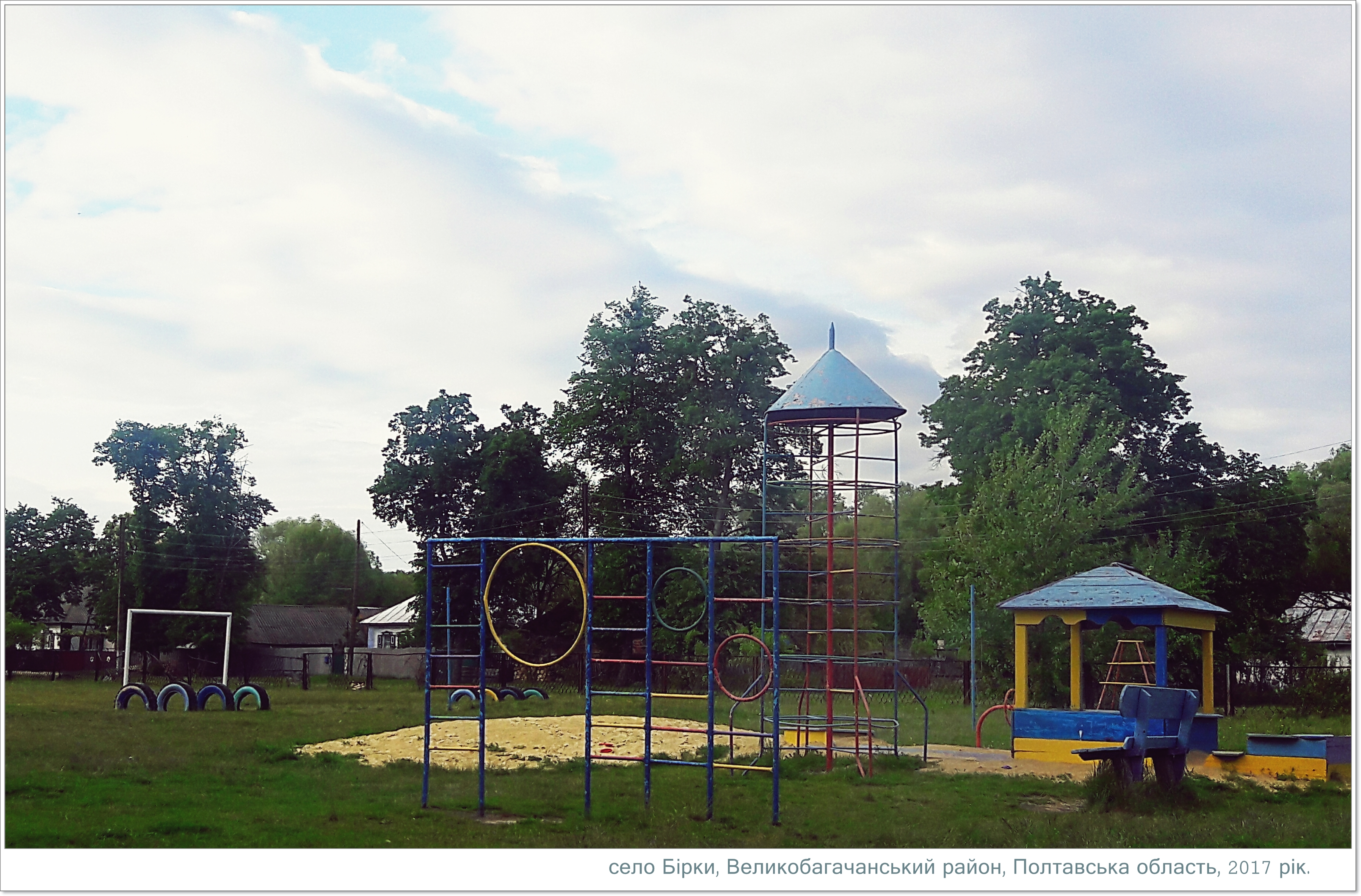 село Бірки, шкільне подвір'я